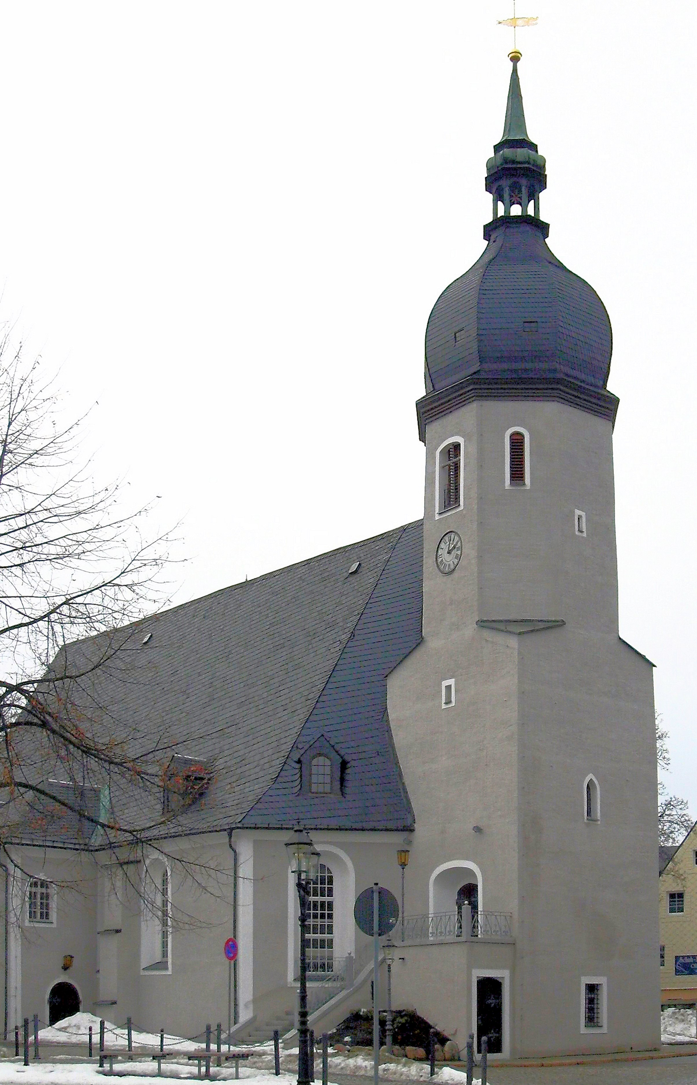 Stadtkirche Olbernhau, Erzgebirge, Deutschland